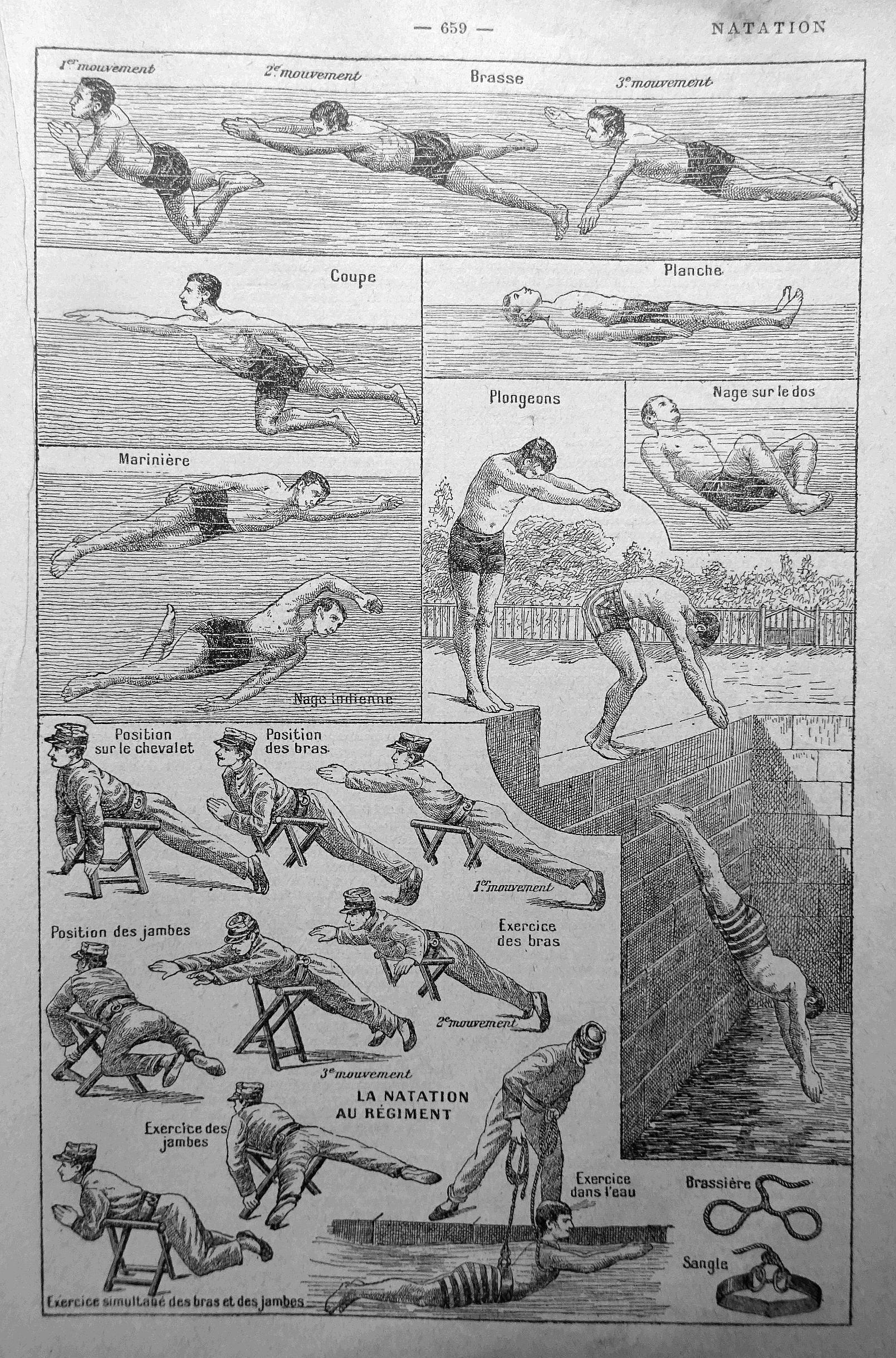 L'apprentissage de la natation au régiment en 1900. — source : Petit Larousse illustré 1918